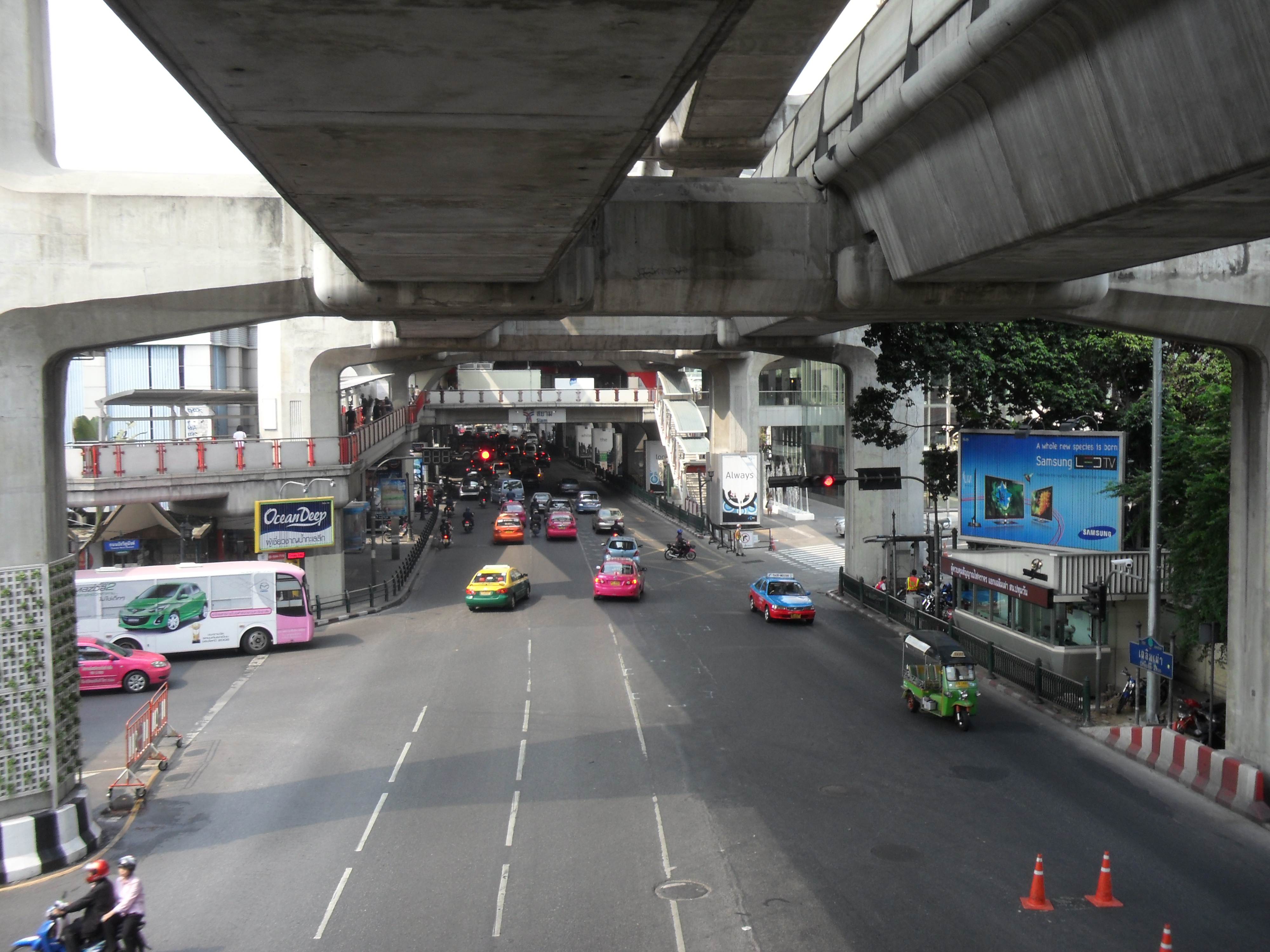 Pathum Wan, Bangkok 10330, Thailand